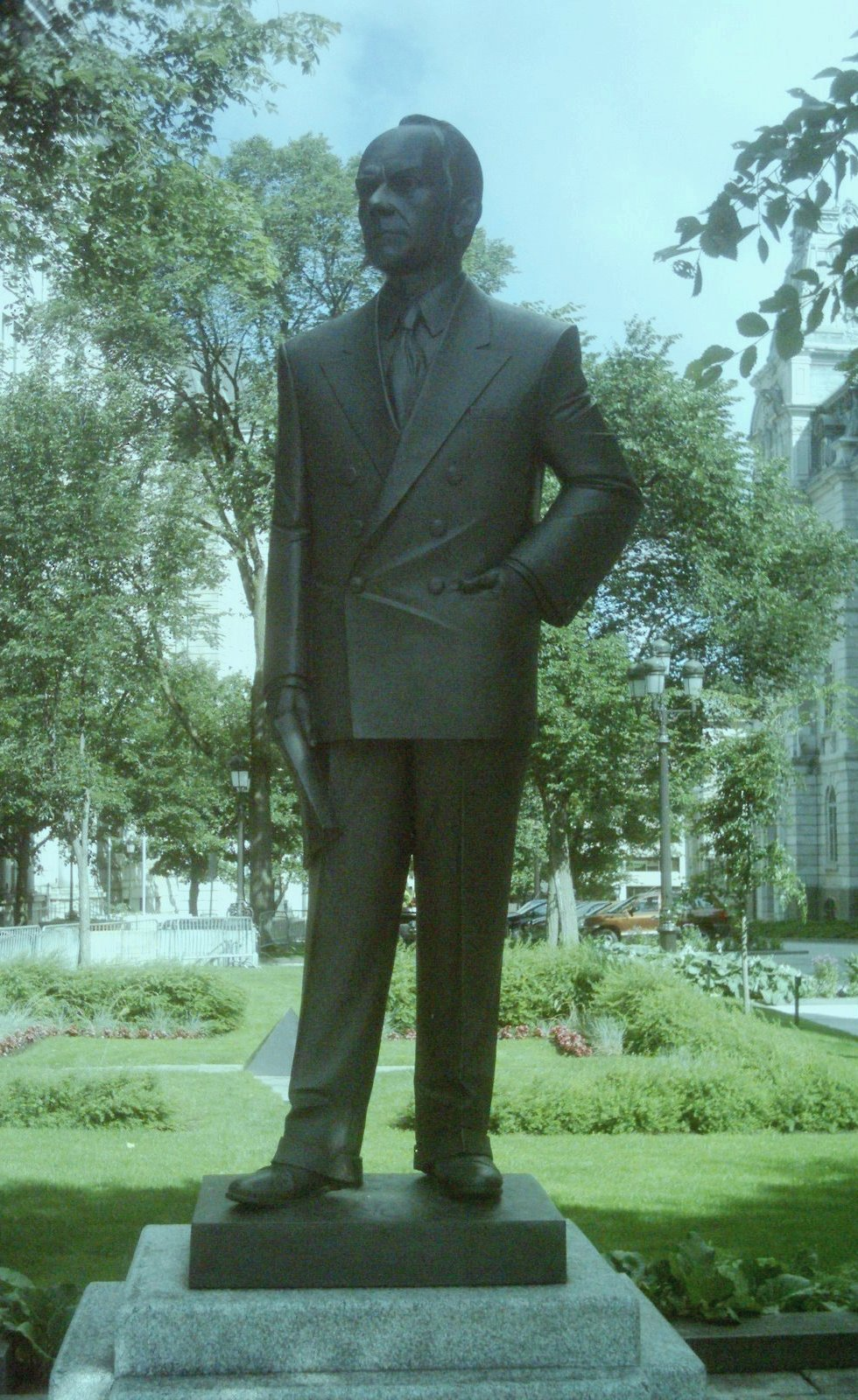 Adélard-Godbout (premier ministre en 1936 et de 1939 à 1944) : Réalisée par le sculpteur Michel Binette, cette œuvre a été inaugurée à l’automne 2000 afin de souligner le 60e anniversaire de l’obtention du droit de vote par les Québécoises